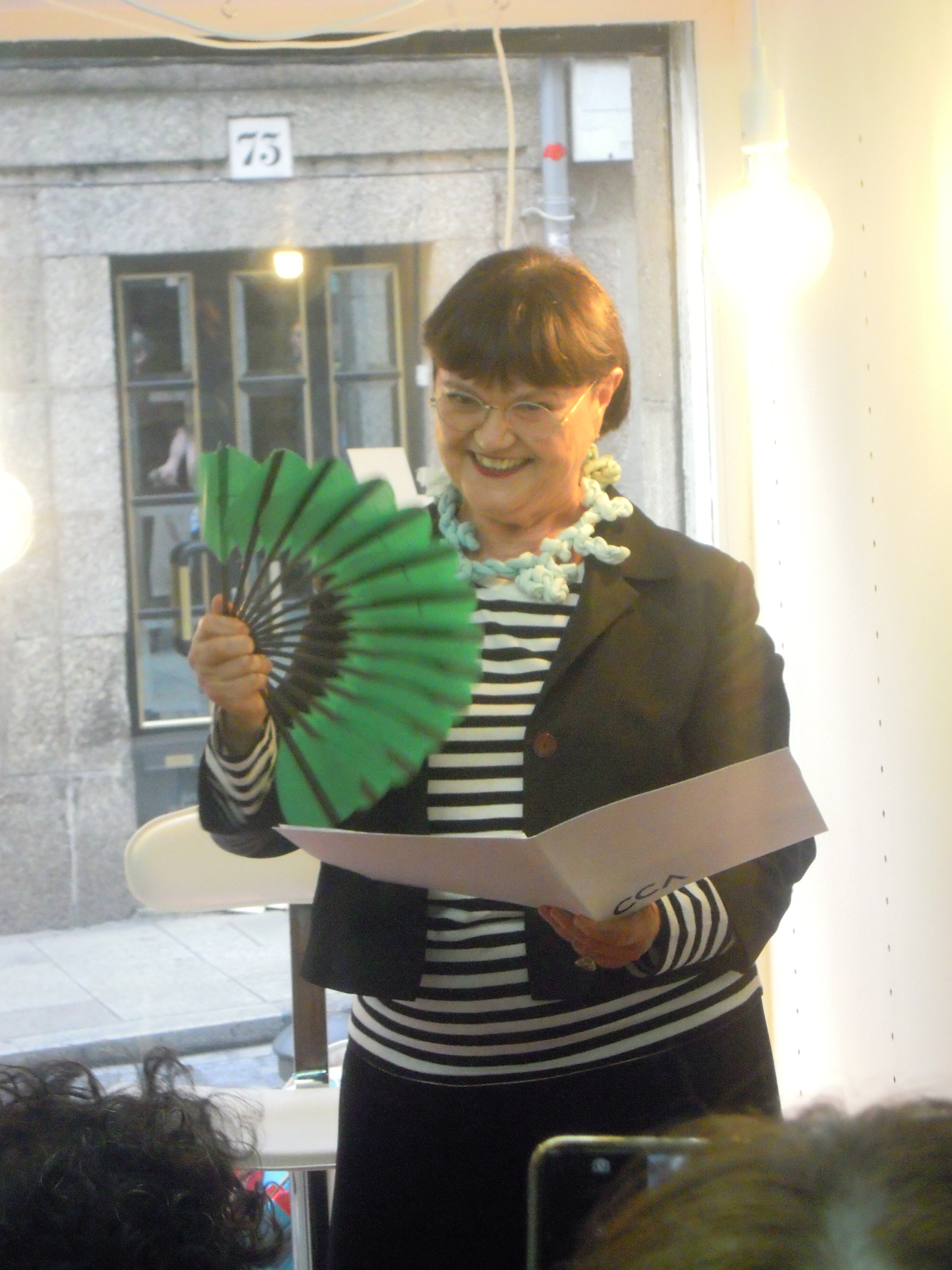 Margarita Ledo recitando na libraría Chan da Pólvora